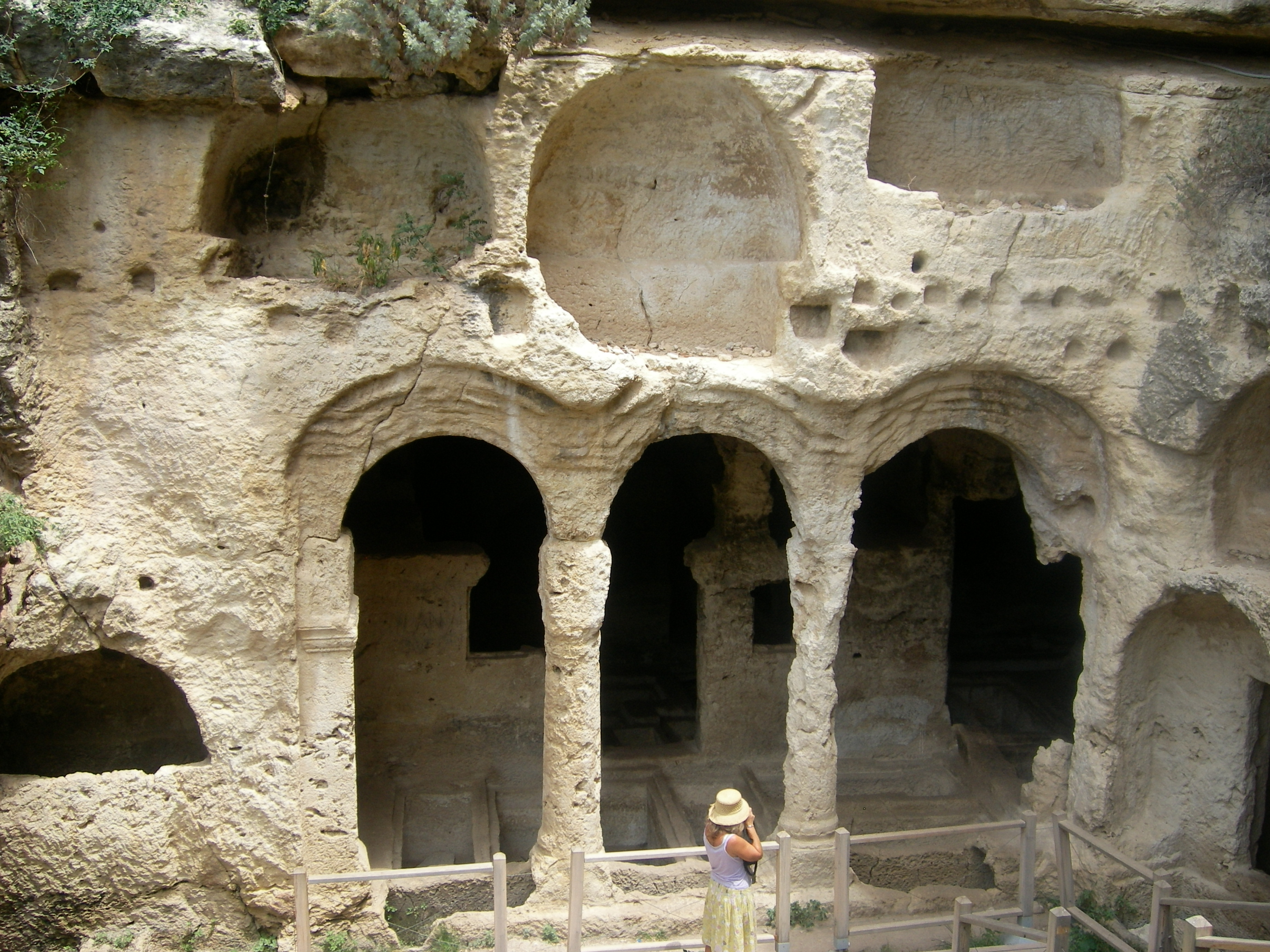 Samandağ'da Beşikli Mağara